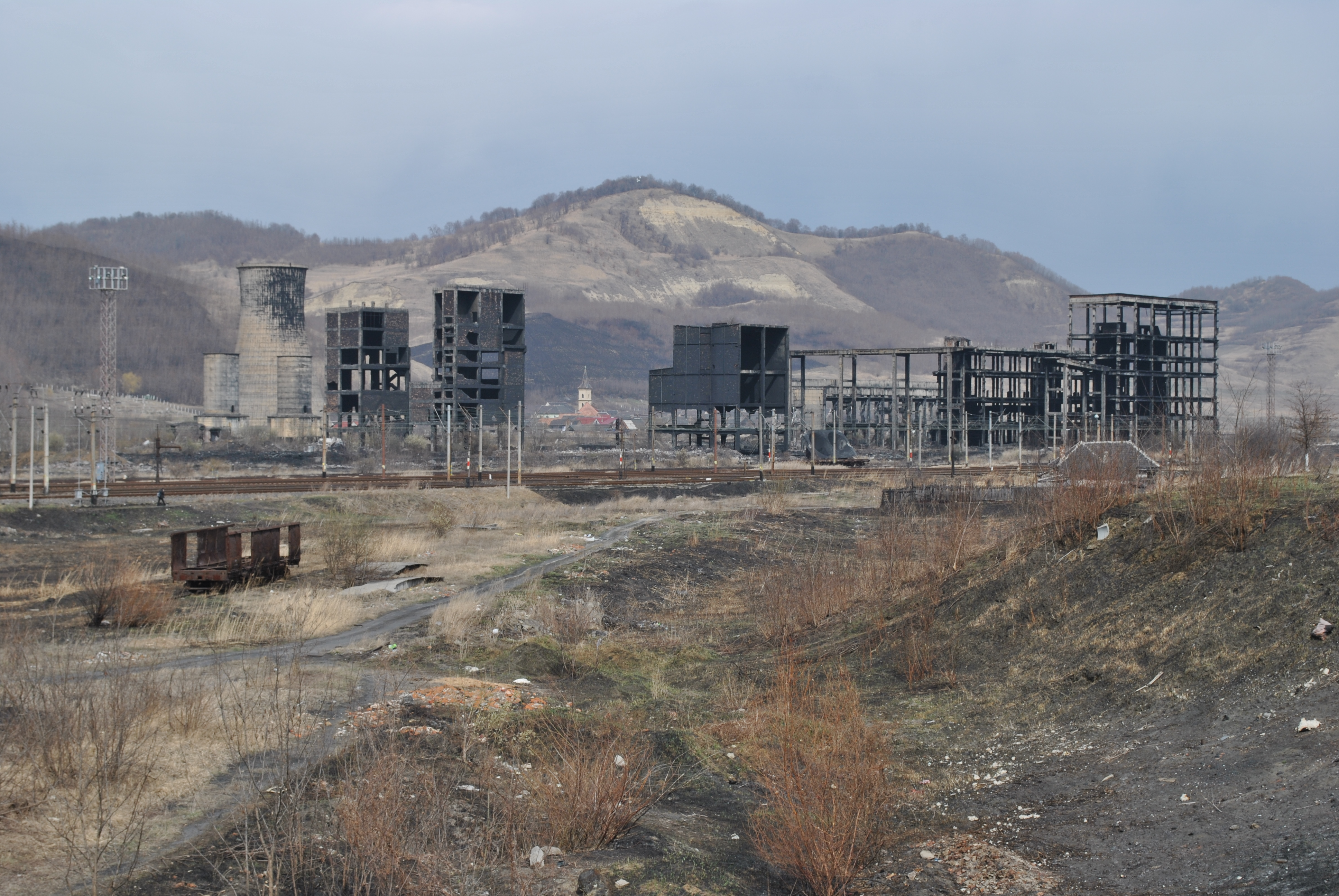 Ruinele uzinei chimice Carbosin Copşa Mică